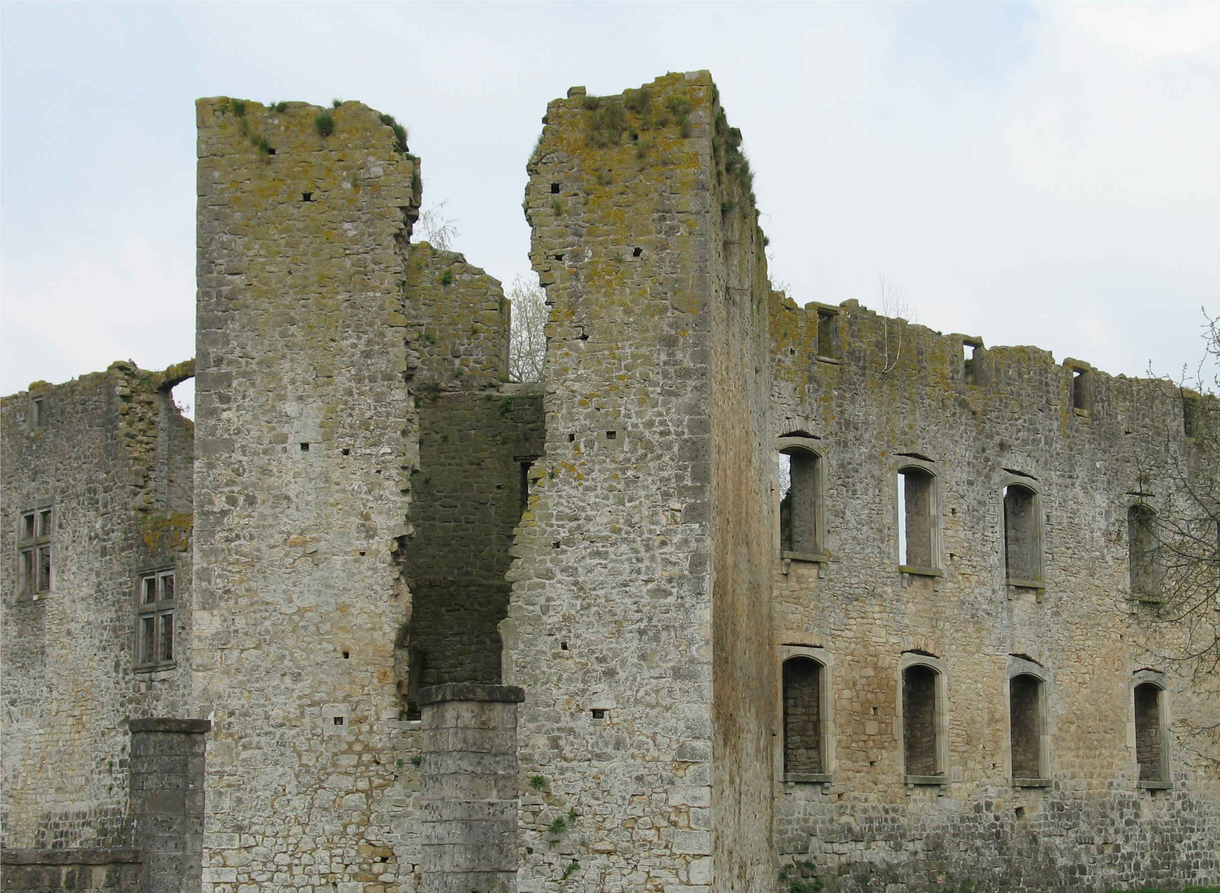 Les ruines du château de Koerich (Luxembourg)